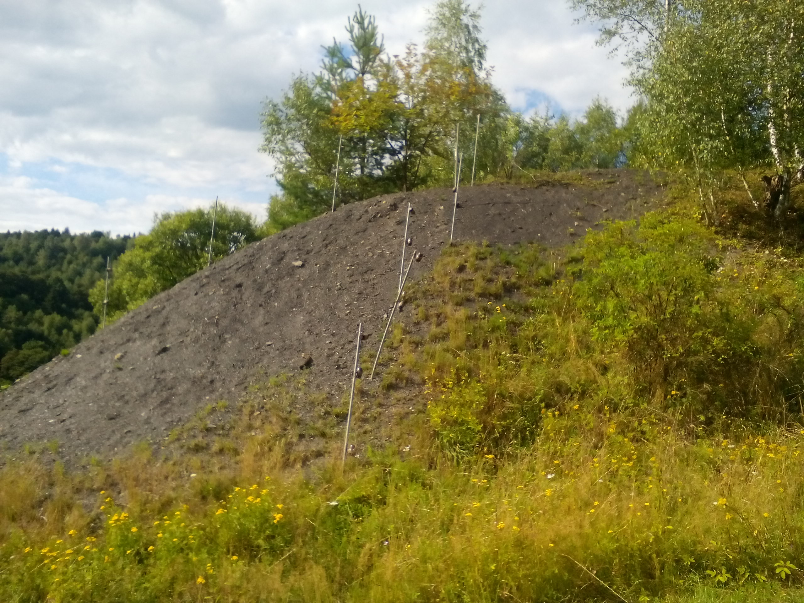 Okolice kopalni Okrzeszyn